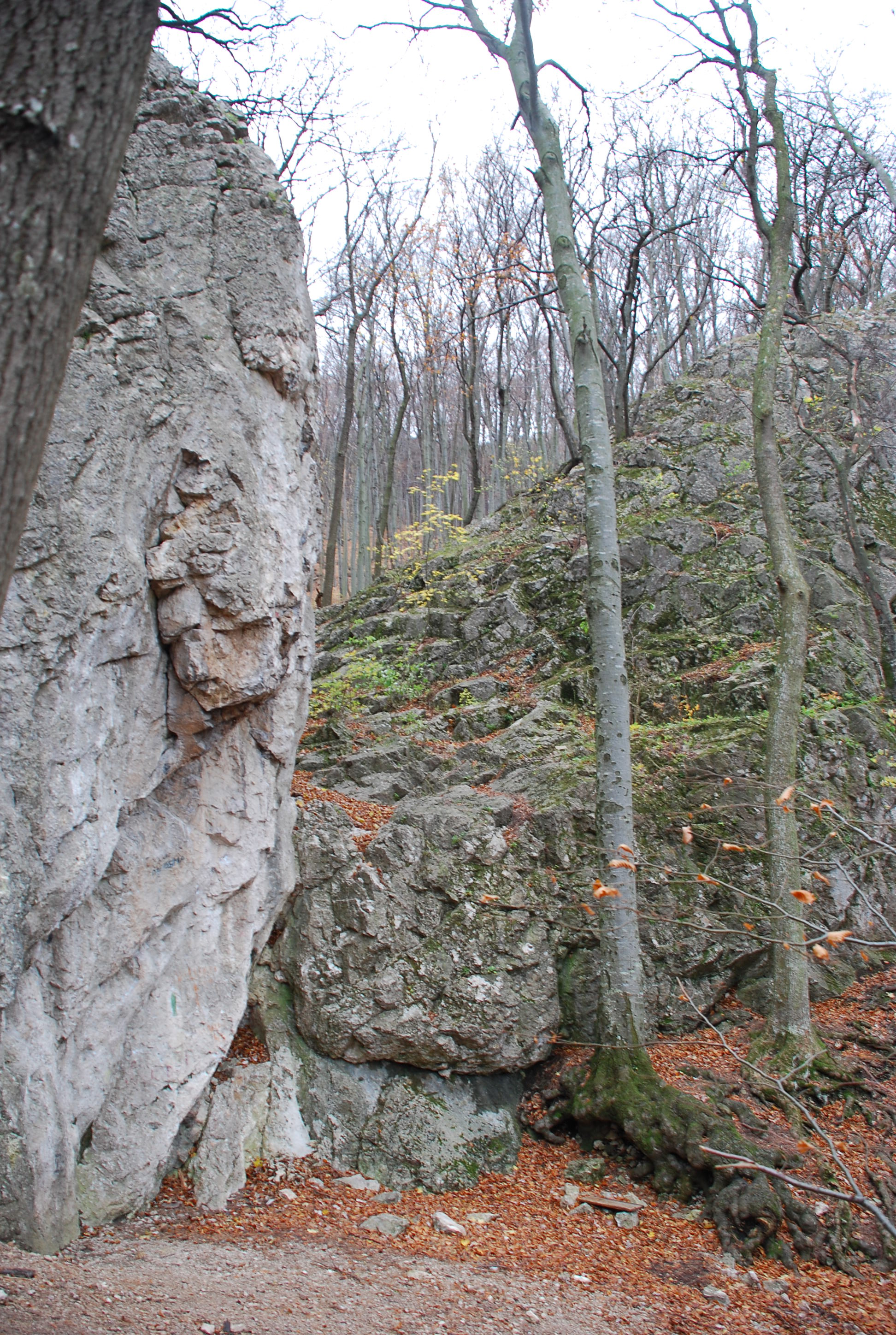 am Teufelstein sind Kletterrouten verschiedener Schwierigkeitsgrade möglich.